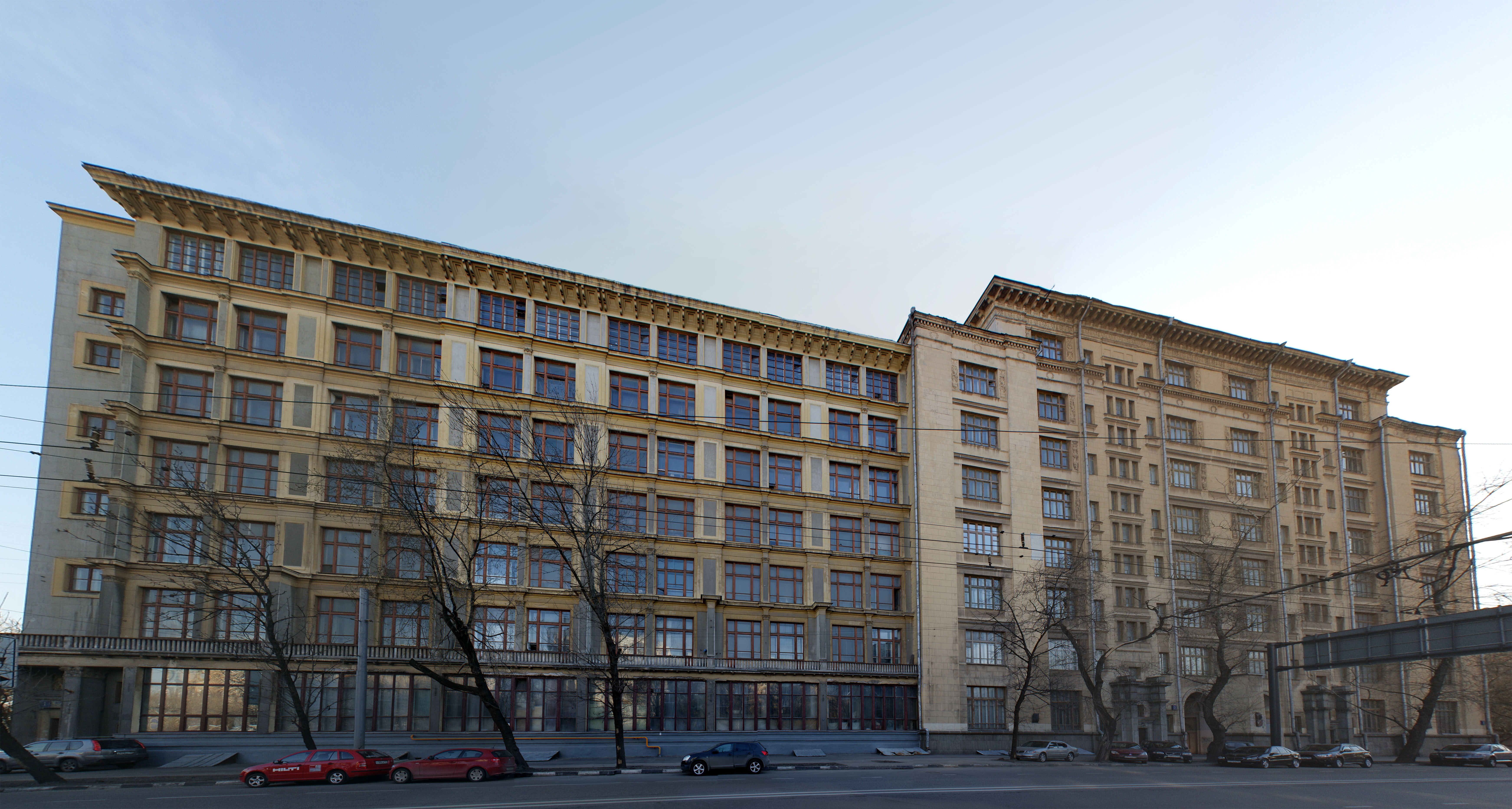 дома 1 и 3 на улице Верхняя Масловка в Москве